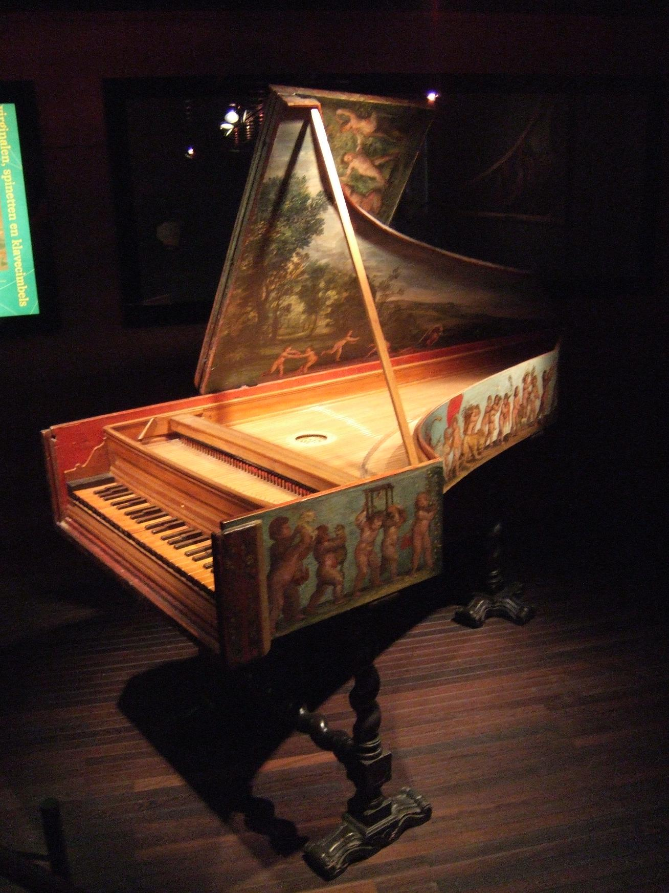 Clavecin par Giovanni Battista Boni (Cortone, 1619) - Bruxelles, Musée des Instruments de Musique